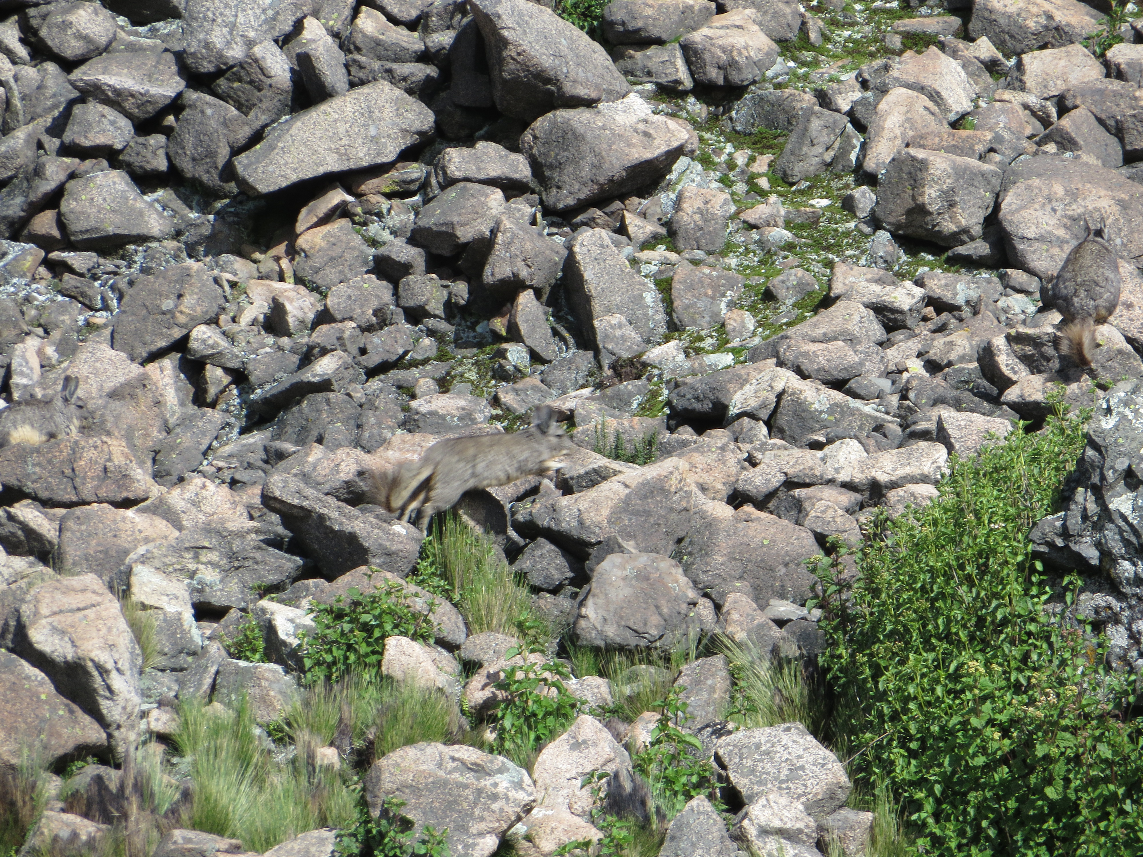 Vizcachas, fotos tomadas cerca de la ciudad de Chicla, camino a Laguna Neveria, Lima, Perú